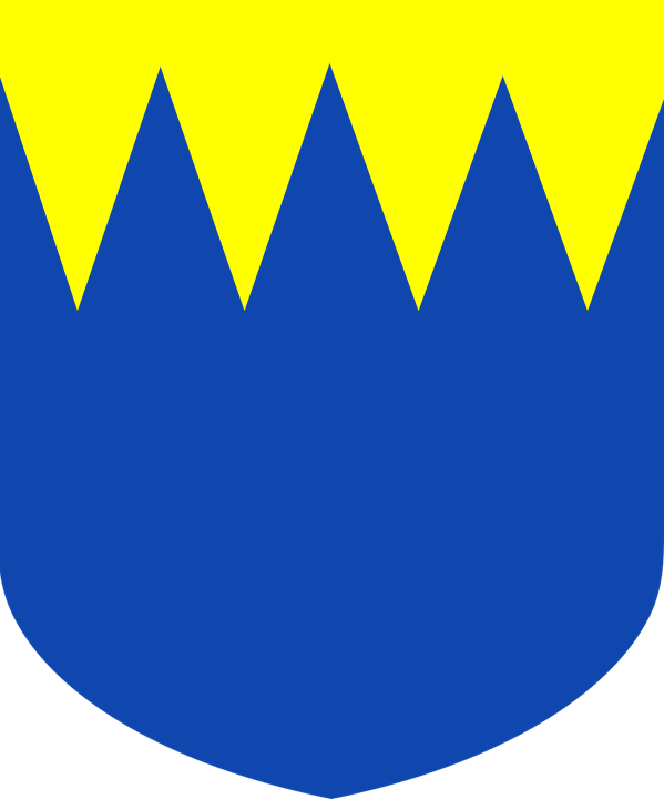 armes des Gantès